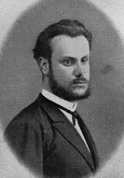 Spanish painter Roma Ribera Cirera (1848-1935)